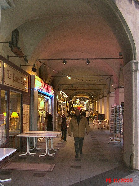 Les arcades de la Place Garibaldi sont plus vivantes en semaine (ici au crépuscule)